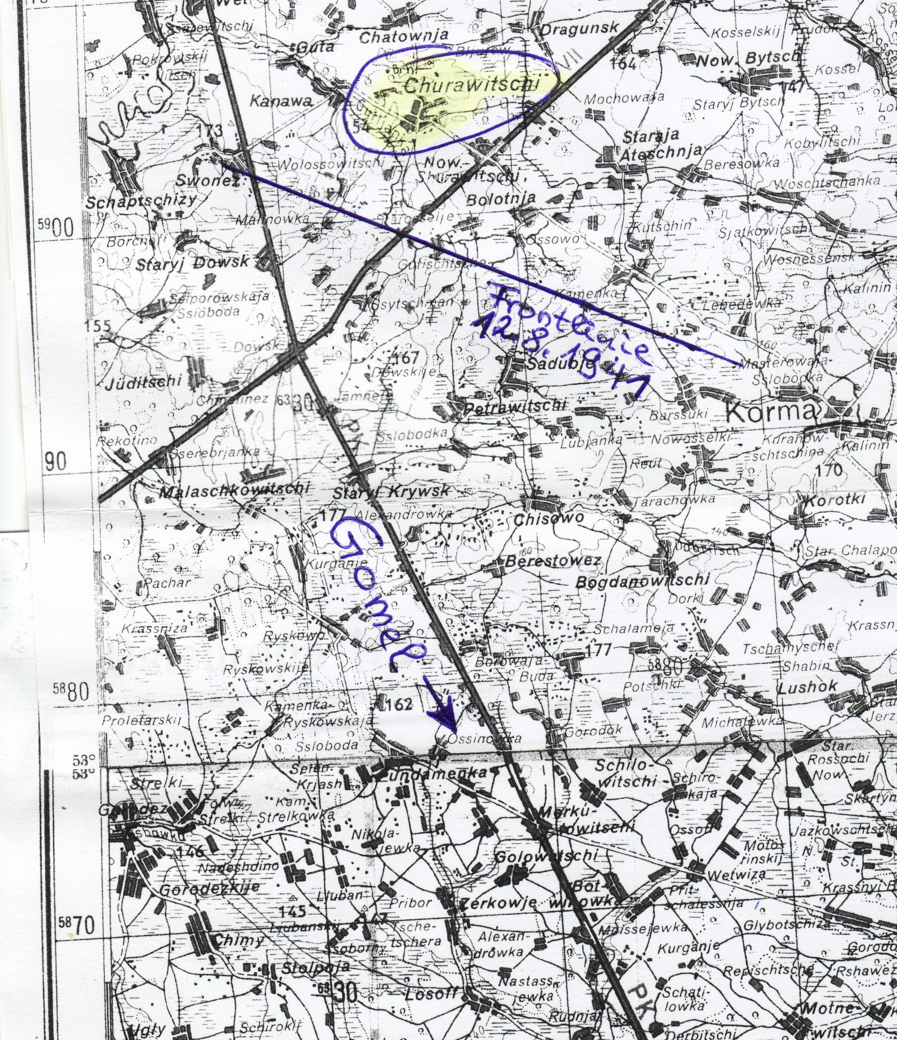 Map Osteuropa 1:300000 Deutsche Heereskarte 1941 Churawitschi Weißrussland Belarus